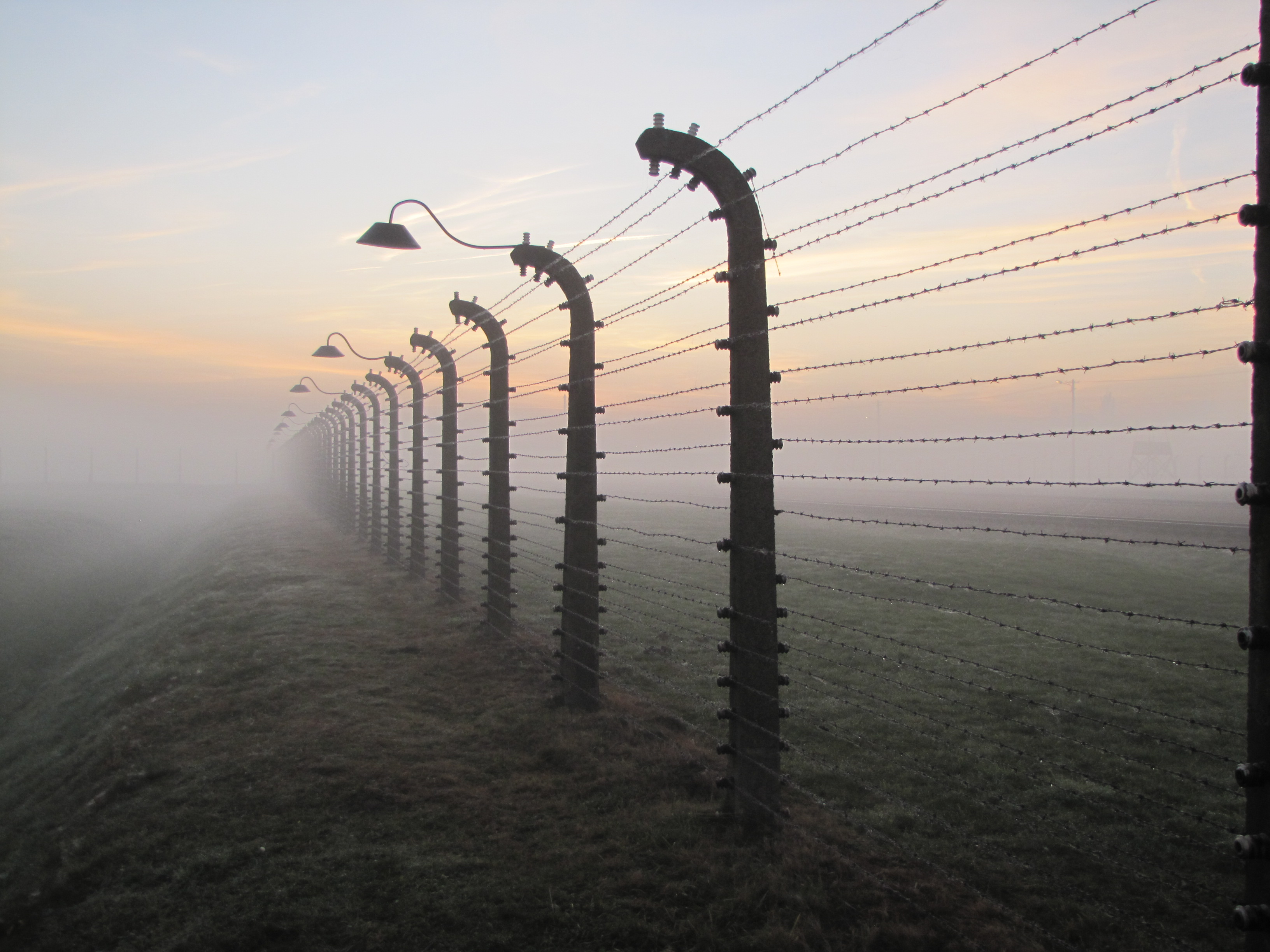 Brzezinka, Auschwitz-Birkenau